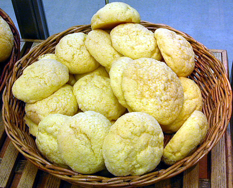 撮影者:小太刀 メロンパン